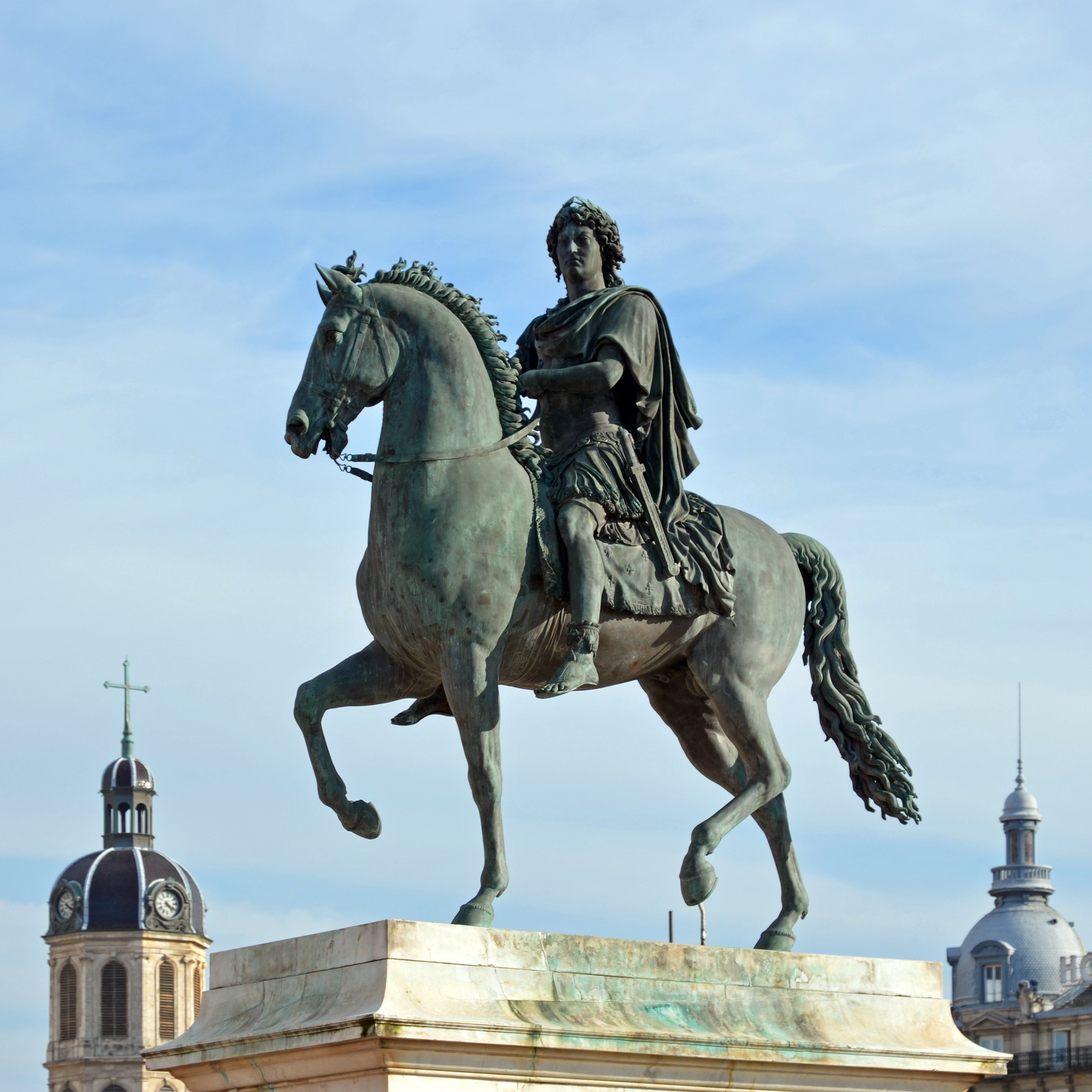 Statue équestre de Louis XIV, place Bellecour, Lyon